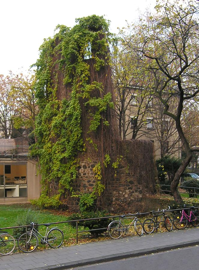 Römerturm Helenenstraße, Köln